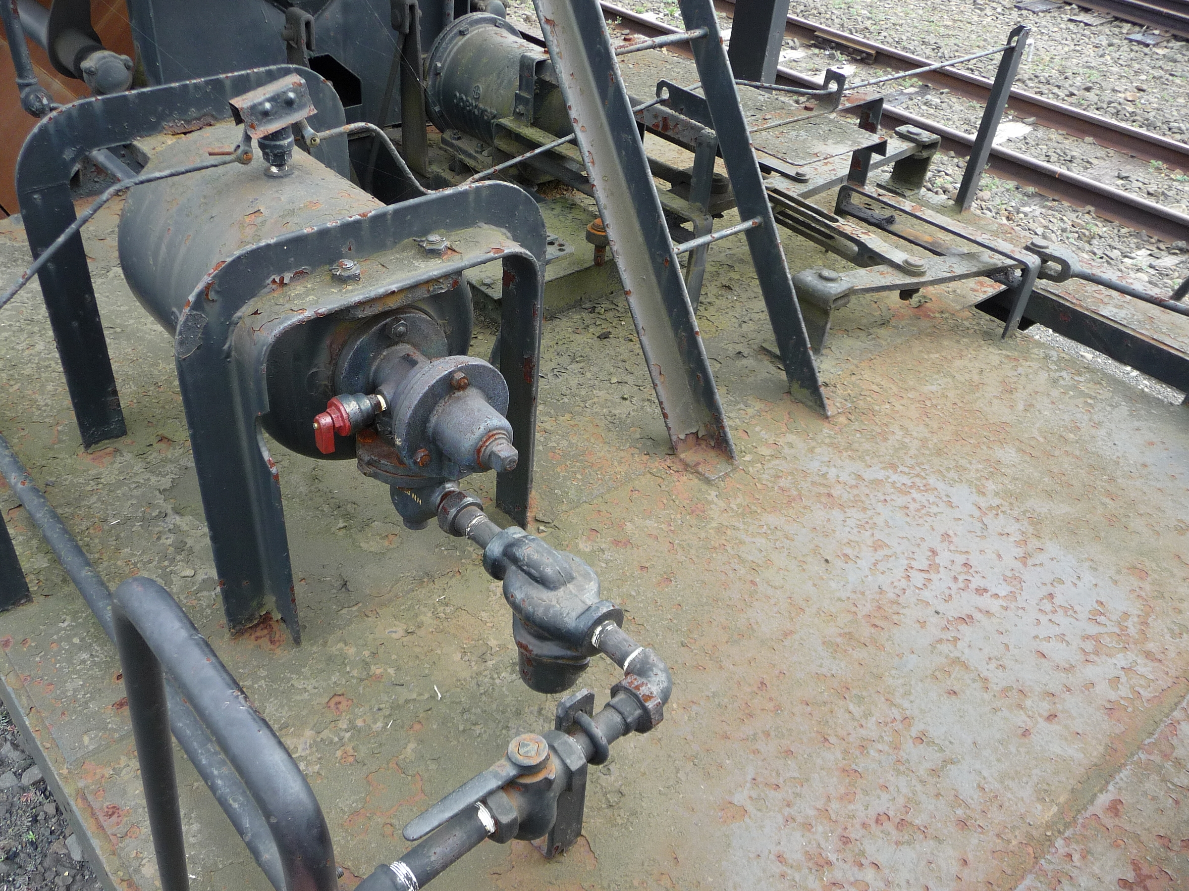 JR北海道ホキ800形貨車のブレーキ装置 釧路運輸車両所の一般公開で撮影